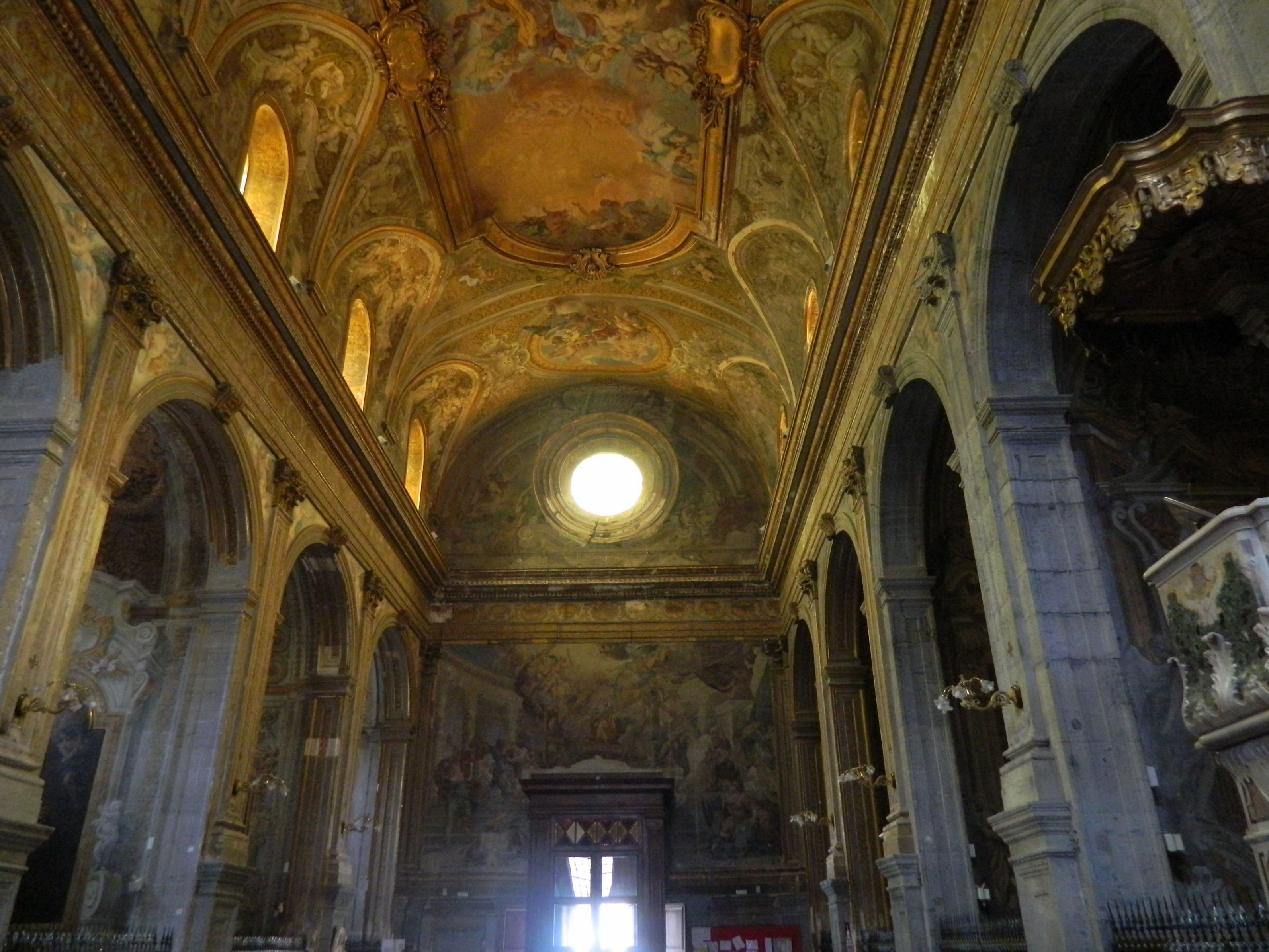 Chiesa di Santa Caterina a Formiello (Napoli) - la controfacciata